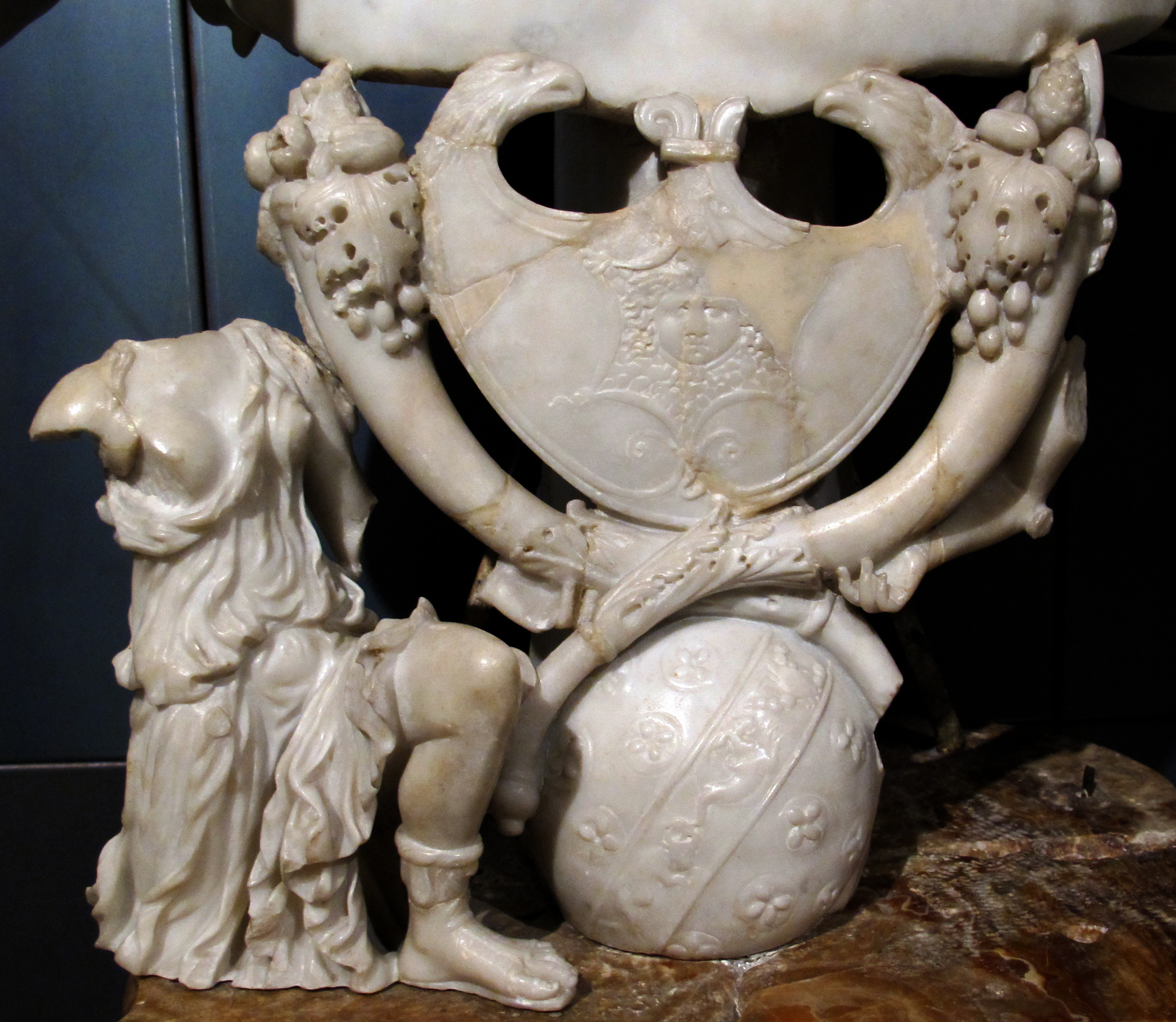 Statue antiche, musei Capitolini, Roma